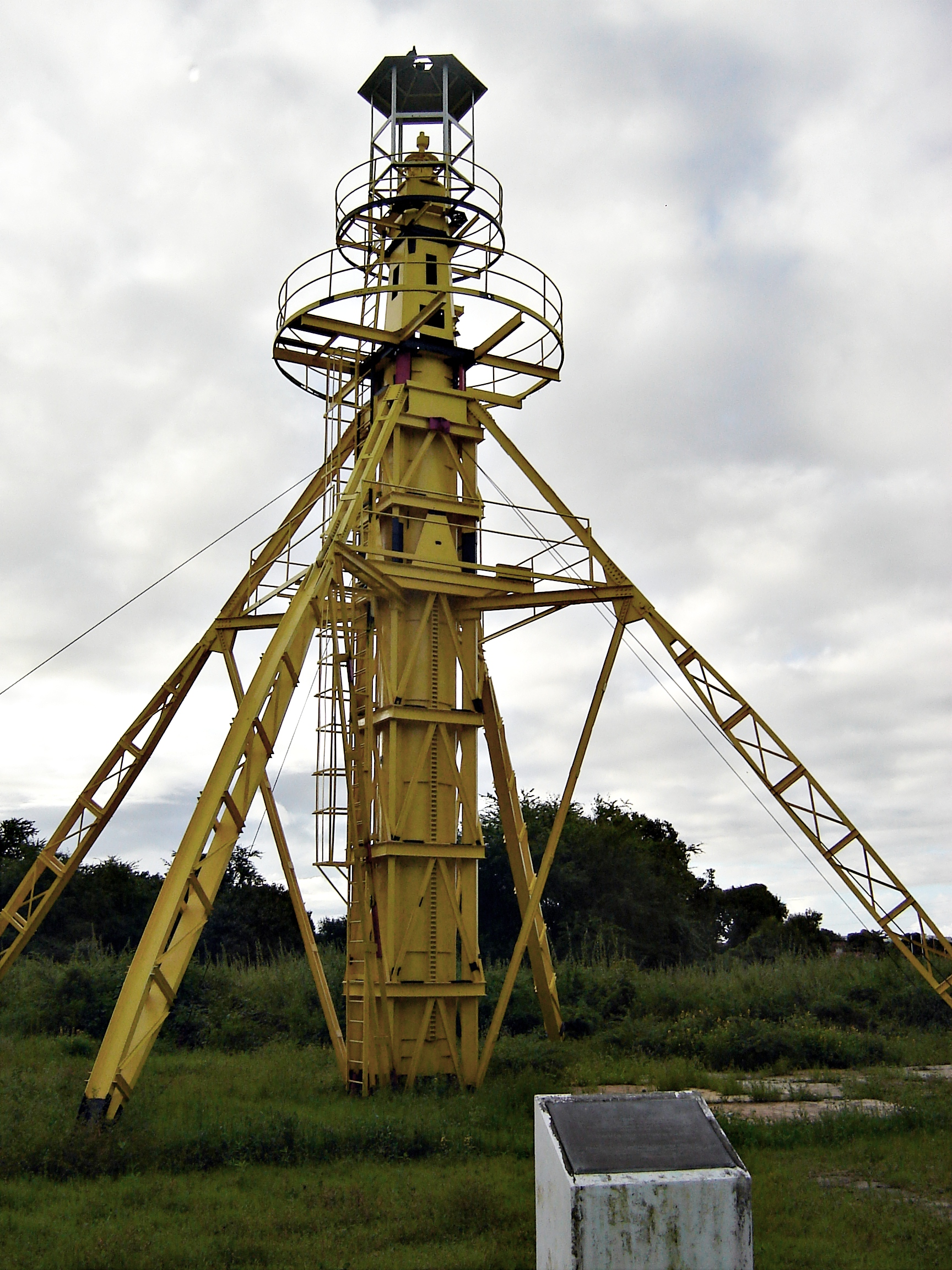 Original erhaltener Landemast für Zeppelin-Luftschiffe, Recife, Pernambuco, Brasilien